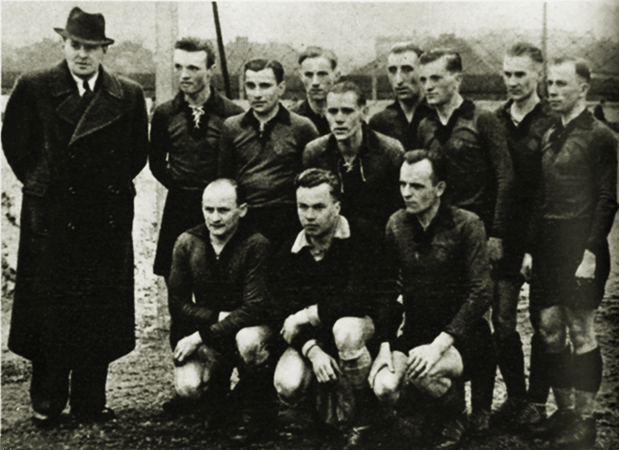 Die Meistermannschaft der Saison 1941/42. (Von links nach rechts: Vereinsführer Bartel, Kulik, Koschny, Spodzieja, Schatton, Piontek, Dzierzok, Pyttel, Litinski; kniend: Knaß, Janik, Kinowski)